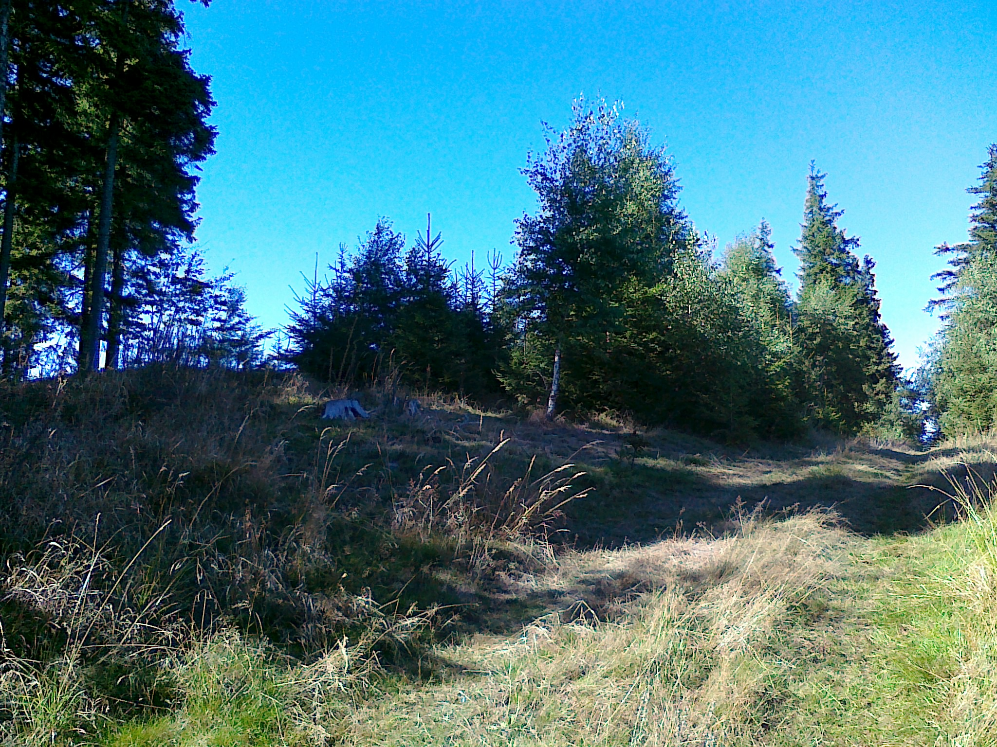 Szczyt góry Vysoká hora - 1031 m n.p.m.